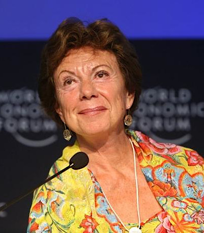 Neelie Kroes, Wettbewerbskommissarin der EU von 2004 bis 2010, beim Inaugural Annual Meeting of the New Champions des Weltwirtschaftsforums, 7. September 2007, Dalian, China.